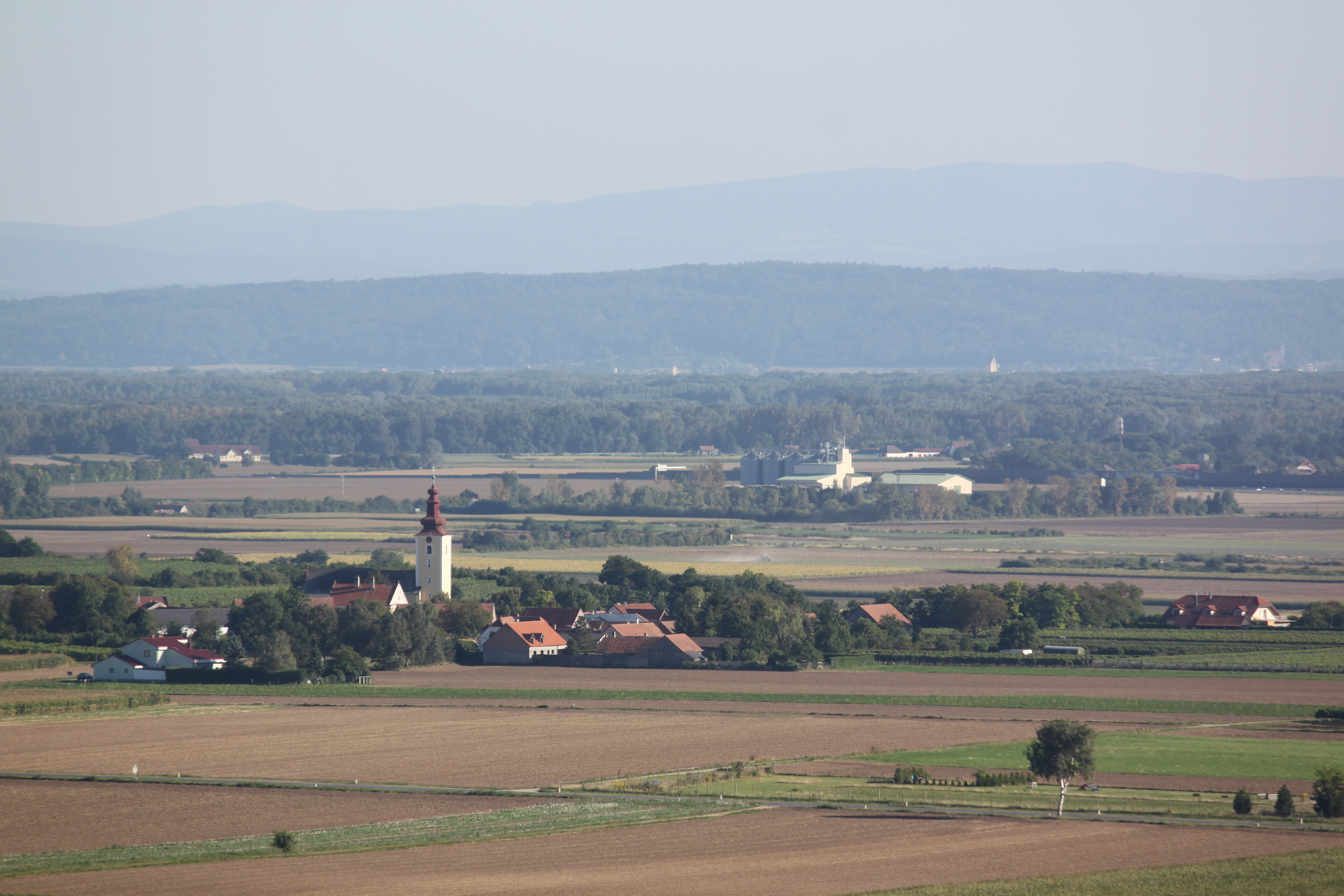 Kath. Pfarrkirche hl. Ägidius, Pfarrkirche Feuersbrunn von der Aussichtswarte Engabrunn aus fotografiert